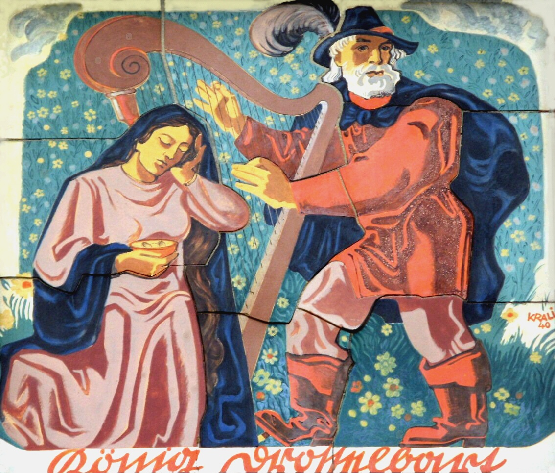 König Drosselbart (1940), Johann-Mithlinger-Siedlung, Raxstraße 7-27, Wien-Favoriten